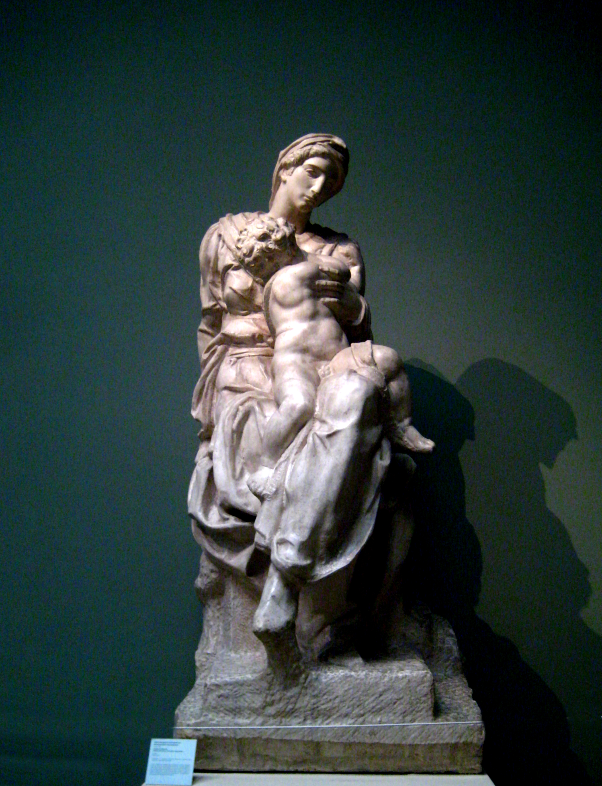 Michelangelo's Madonna Medici